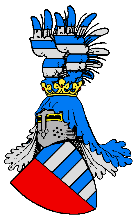 Stammwappen der böhmischen Czernin von Chudenitz.